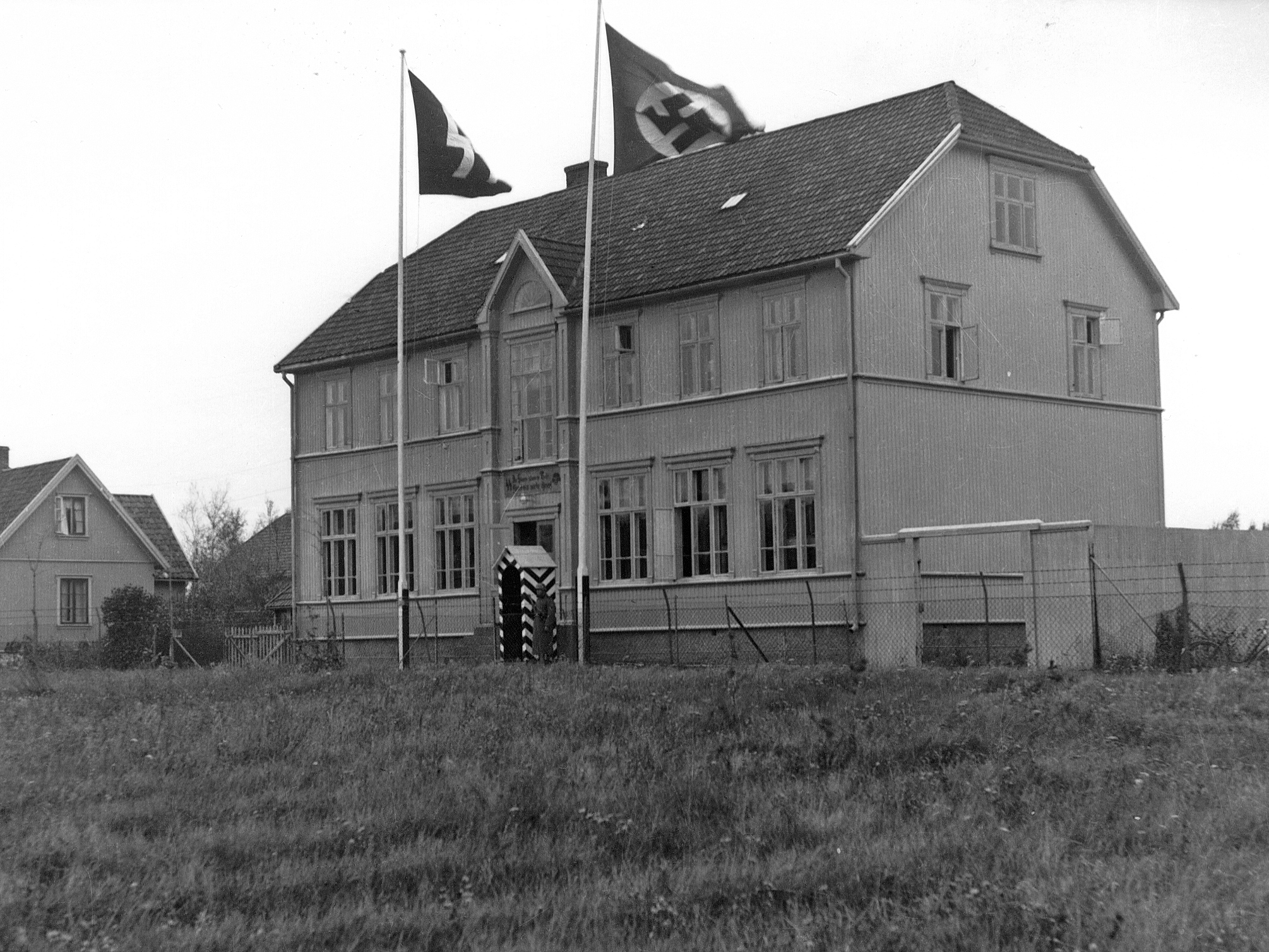 Bildet er hentet fra Arkivverket. I 1942 ble skolen brukt til kaserne for tyskerene og elevene flyttet til Presterød og Husvik skoler. Russiske krigsfanger både i øverste etasje. Bruken av skolen endret seg basert på periodiske behov. Arkivinstitusjon : Statsarkivet i Stavanger Arkivnavn : Pa 1536 - Esso Norge as, Vallø Oljeraffineri og lager Sted : Norge, Vestfold, Tønsberg, Valløy Emneord: Olje, Oljeraffineri, Petroleum Avbildet